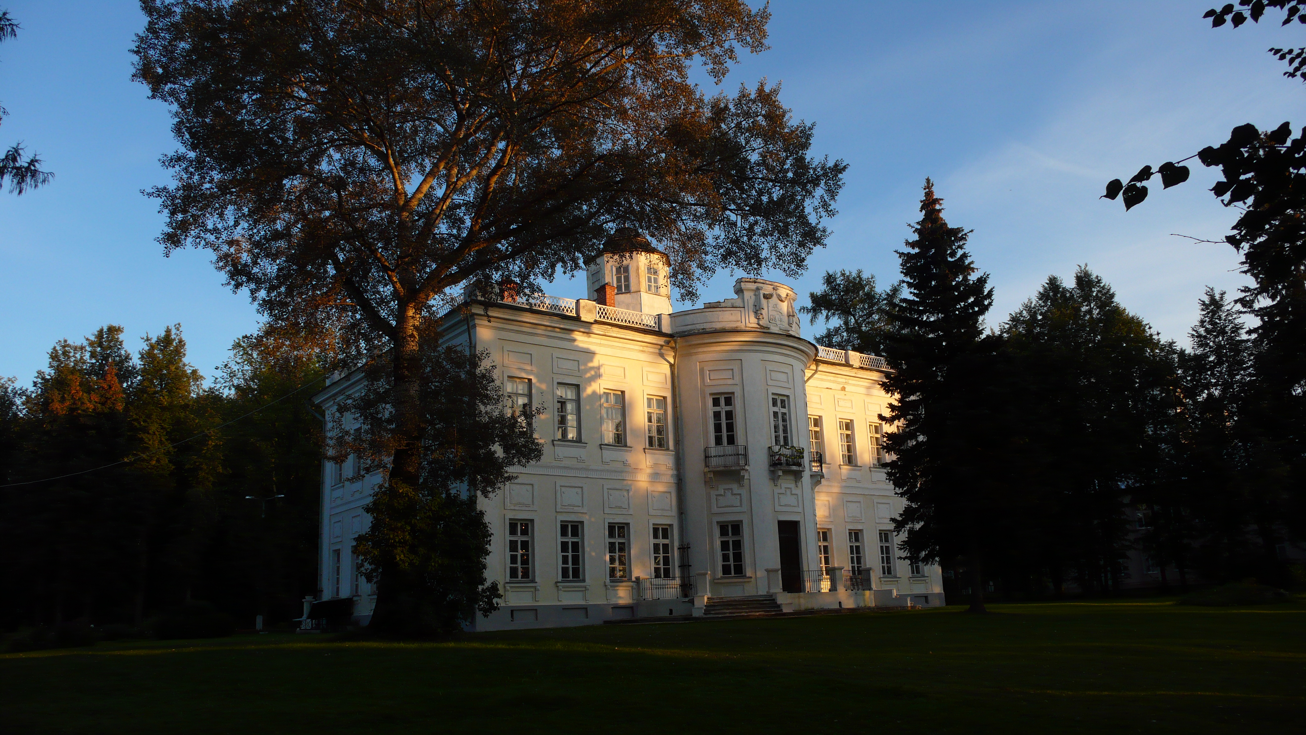 Главный дом (Москва и Московская область, Голицыно, село Большие Вяземы)